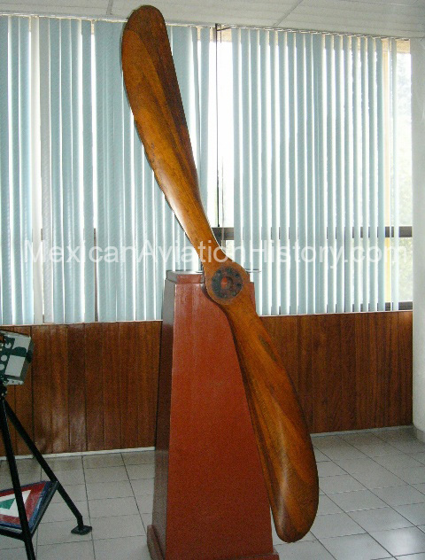 (hélice Anáhuac) Primer correo aéreo en México. Tte. P.A. Horacio Ruiz Gaviño, 6 de julio de 1917; se efectuó en un biplano serie A No. 6 de construcción nacional con motor de 150 a 160 C.F. de fabricación Hispano-Suiza; la ruta postal fue Pachuca-México y la valija número 449. Primera hélice construida en México. Hélice Anáhuac, sometida a prueba el 26 de octubre de 1915 con resultados satisfactorios; fue diseñada por el Cap. 2/o. Ing. en Aeronáutica Juan Guillermo Villasana López, quien además en 1910 trabajó como mecánico de Alberto Braniff y lo ayudó para la realización de su primer vuelo en México.